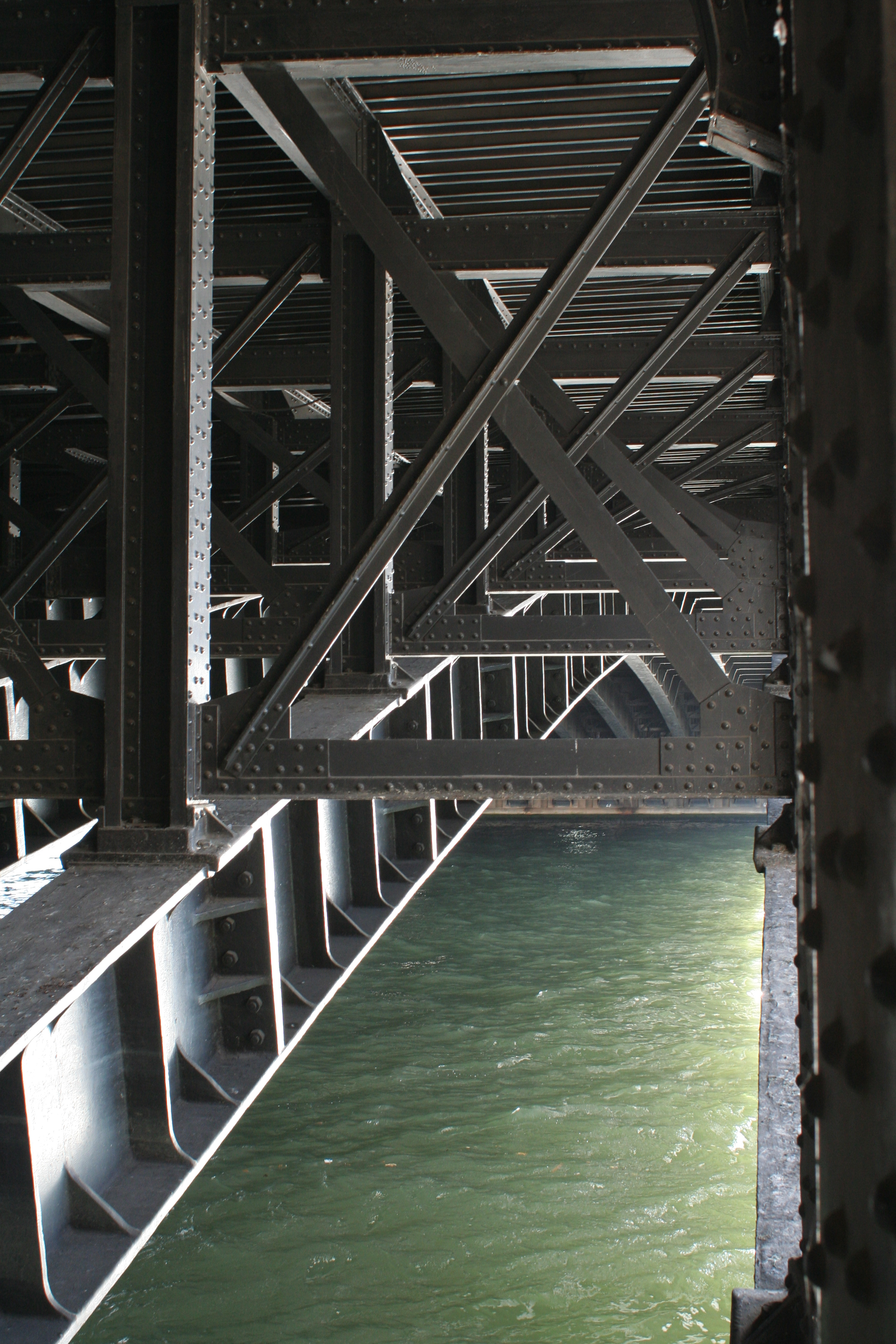 Structure en acier du pont Alexandre III, vue du dessous.